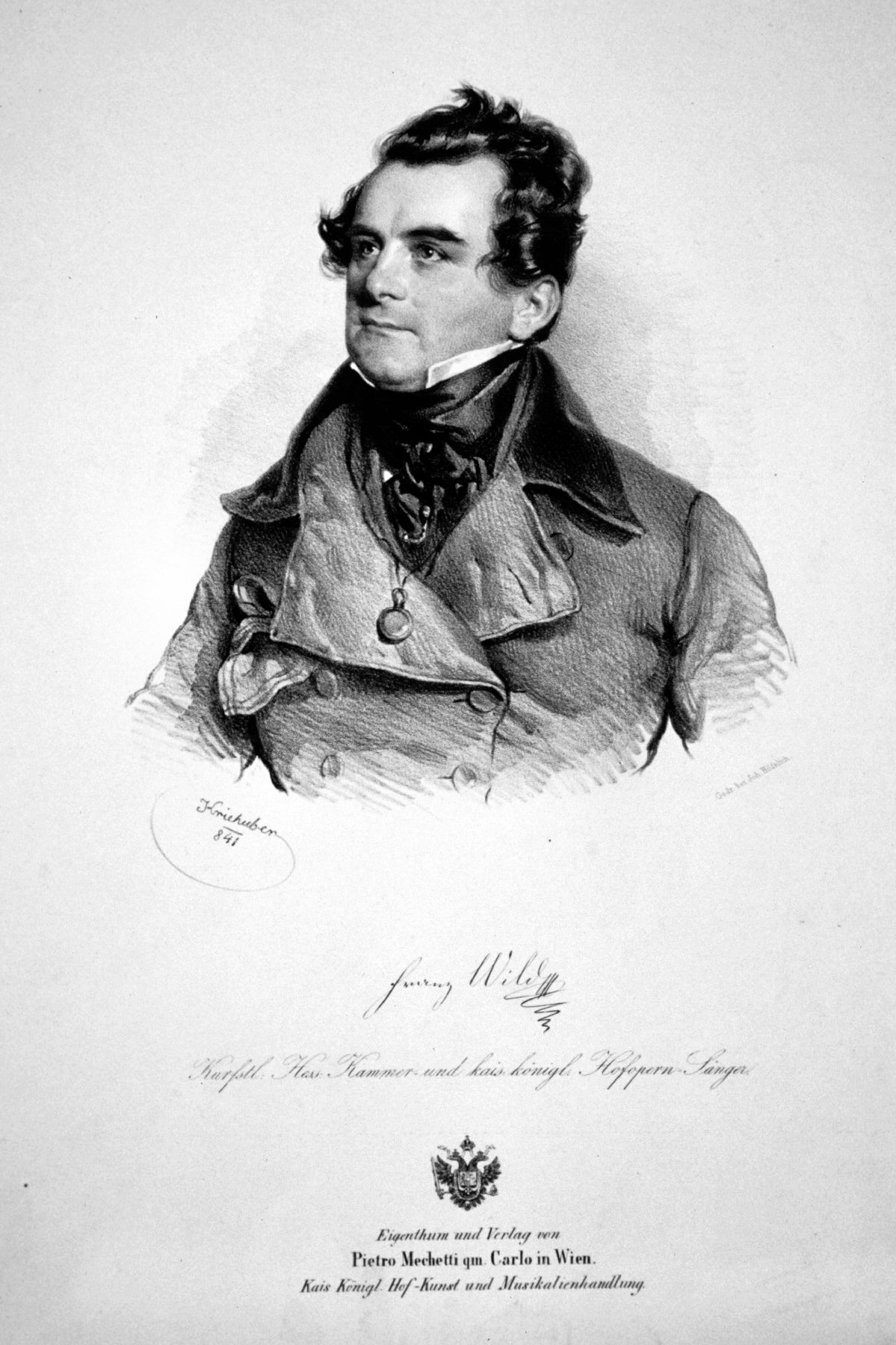 Feranz Wild (1791-1860), Österreichischer Opernsänger (Tenor)